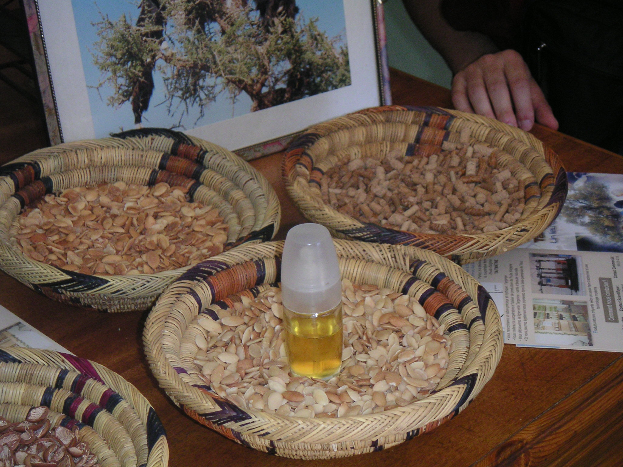 Amandes et huile d'argane